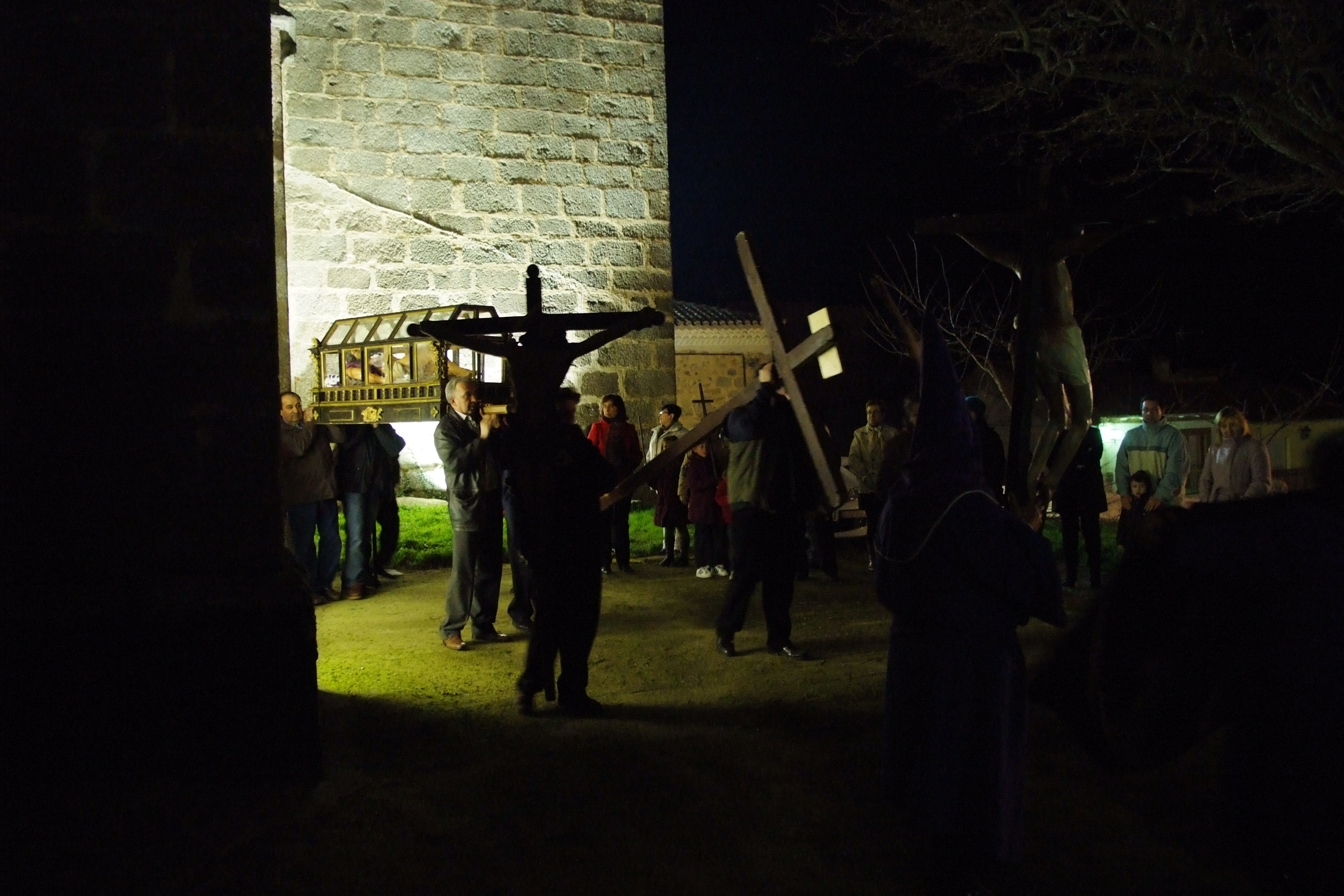 Procesión nocturna del Viernes Santo (Villafranca de la Sierra, provincia de Ávila, España).